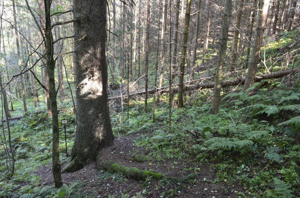 Grøumgrana har overlevd to tregenerasjoner, og står nå midt inne i en klynge av ungtrær.